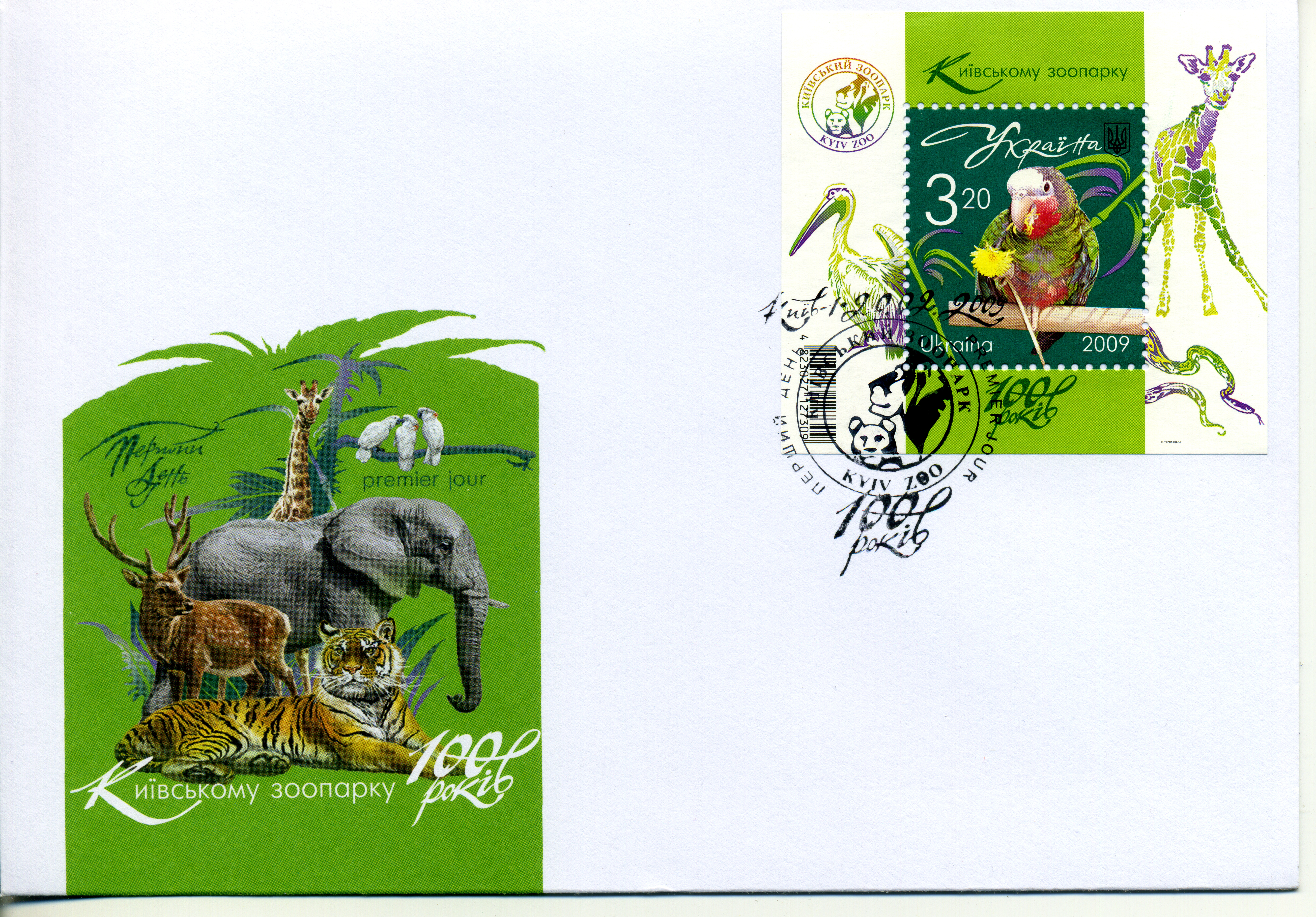 2009. Конверт. 100 лет киевскому зоопарку